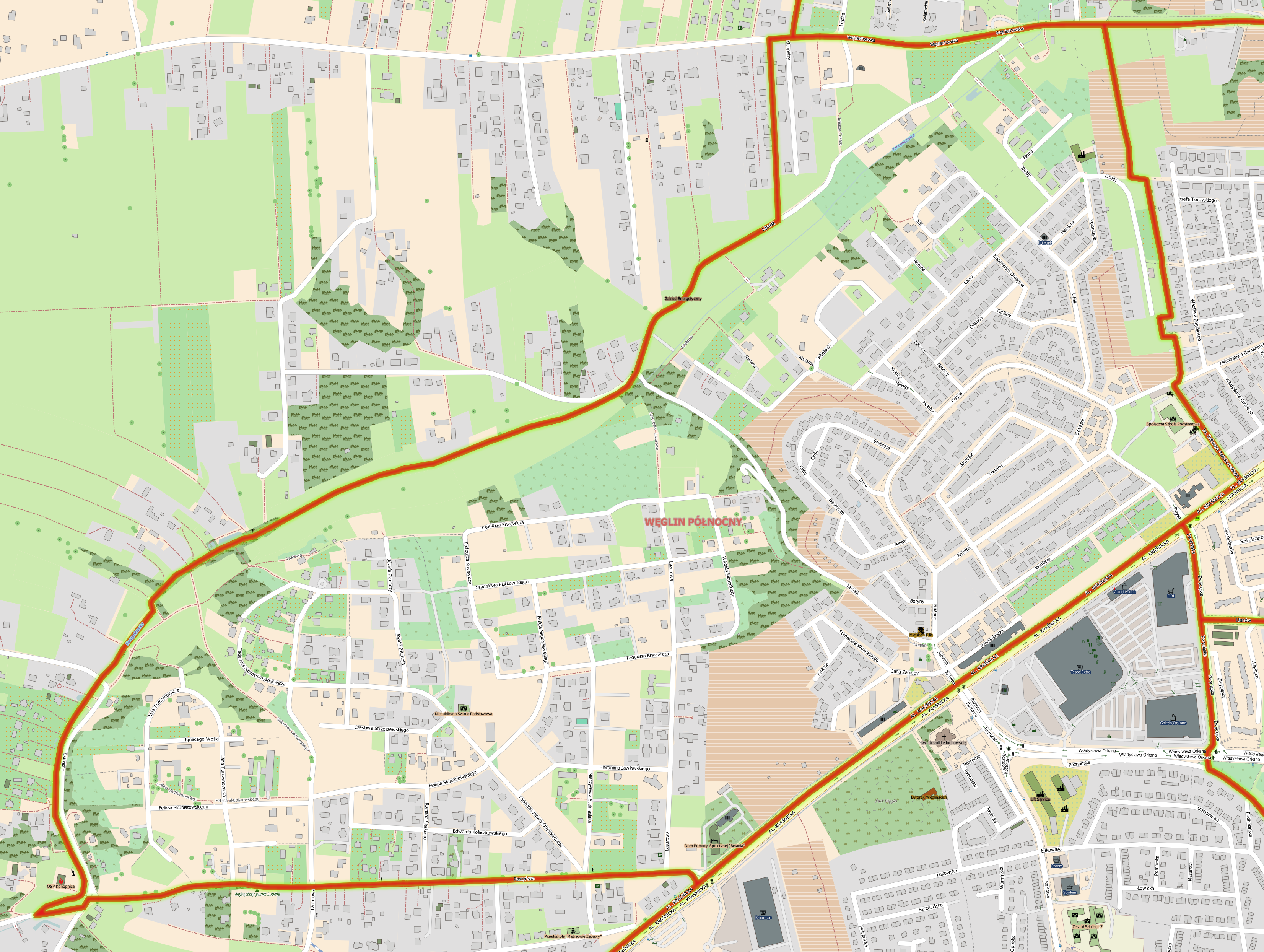 Plan dzielnicy Węglin Północny w Lublinie.